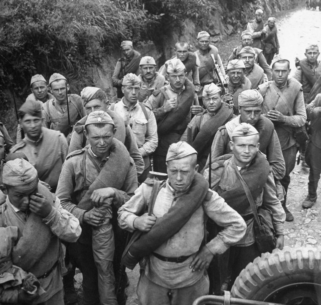 Советские солдаты в Корее. Октябрь 1945 года.